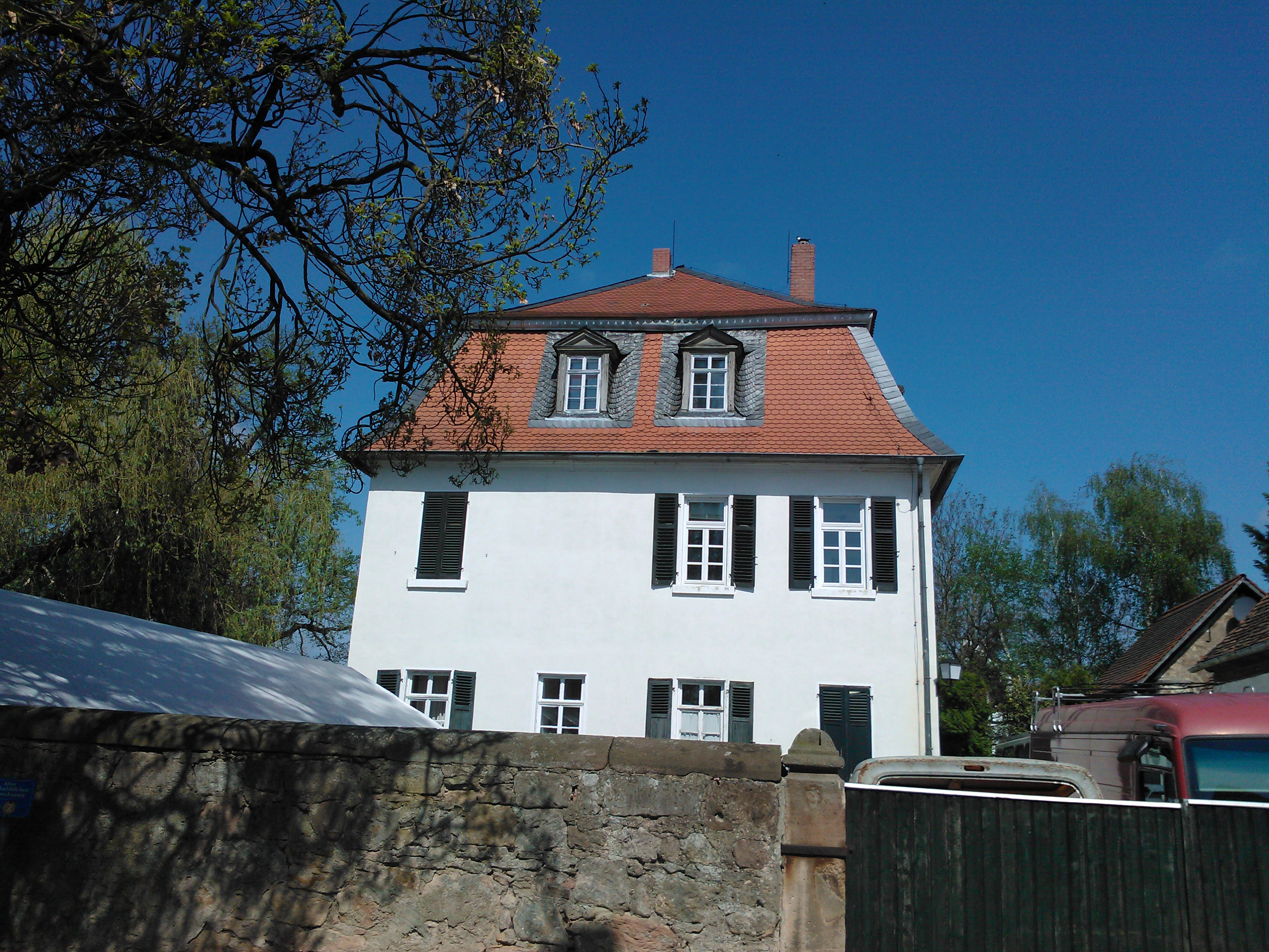 Seitenansicht des Jagschlösschens Harreshausen. Denkmalschutz, zweigeschossig, Mansardwalmdach, mit Resten des ehemaligen Forstgartens, Privatbesitz